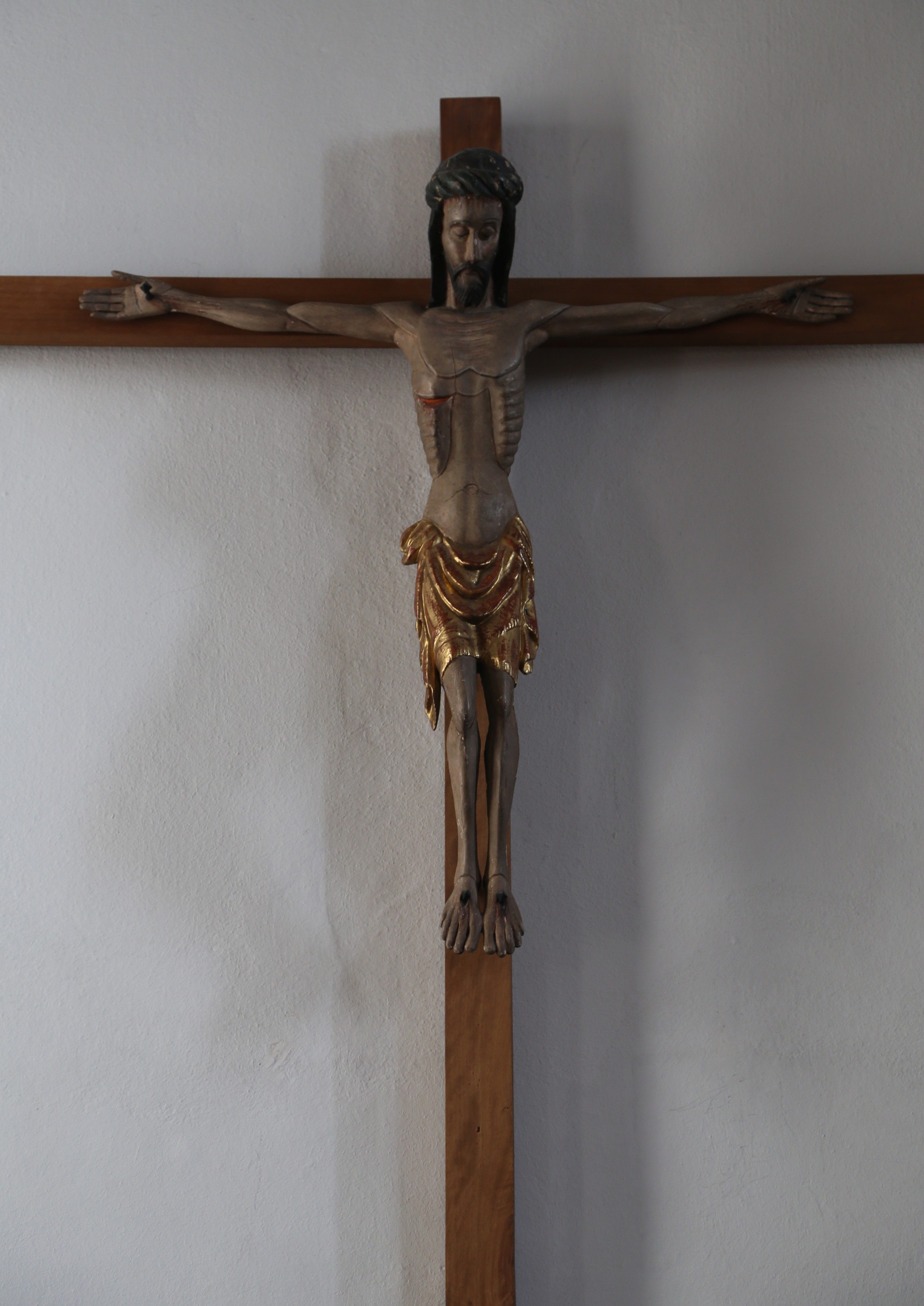 Kruzifix mit spätromanischem Christus, in St. Otto, Ottobrunn